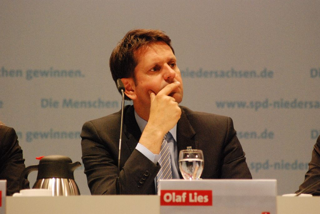 Olaf Lies bei der Landesvertreterversammlung der niedersächsischen SPD zur Bundestagswahl 2009